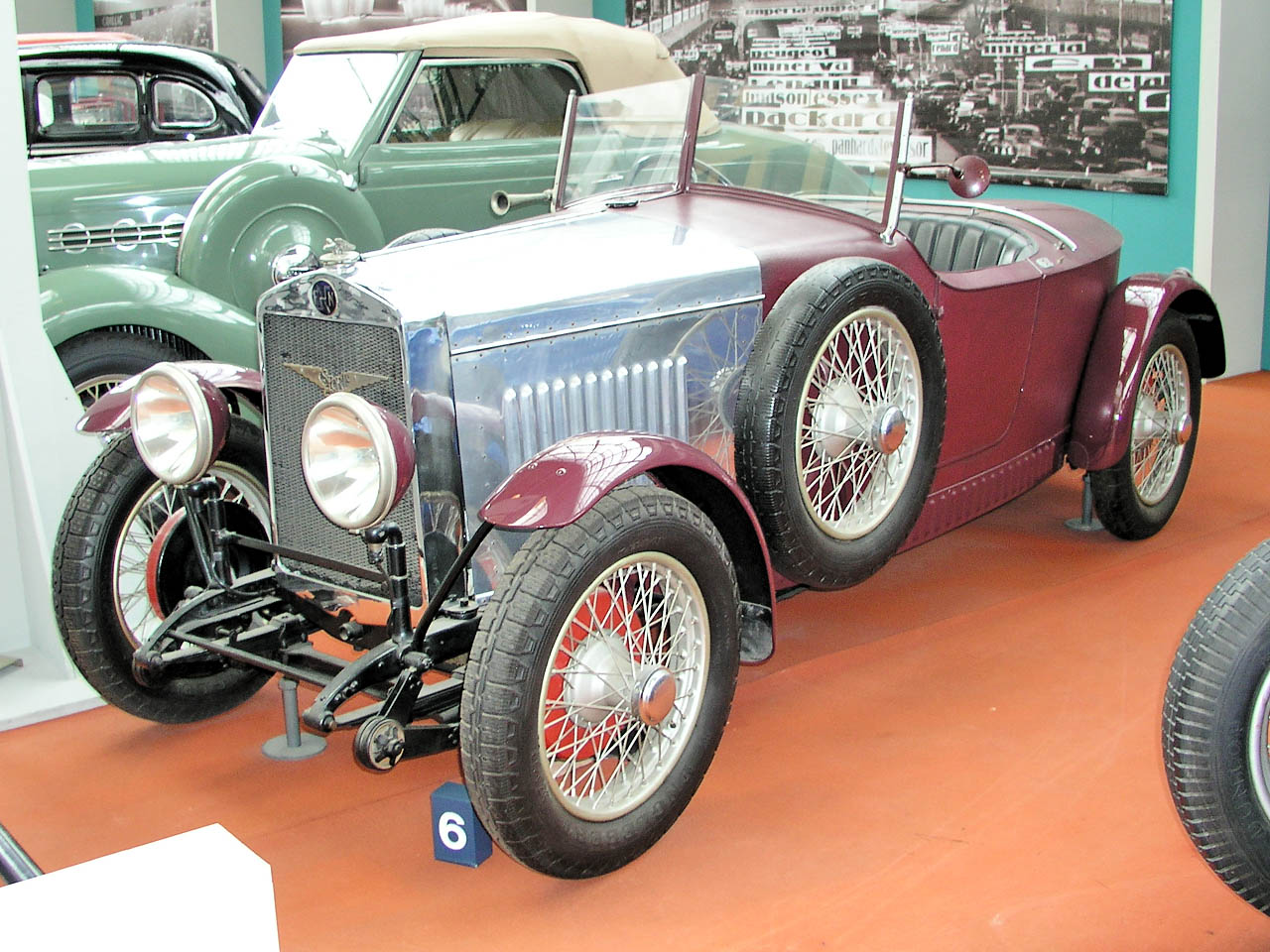 1.4 litre 4-cylinder sports car, made in Belgium by Fabrique Nationale d'Armes de Guerre; front-side view